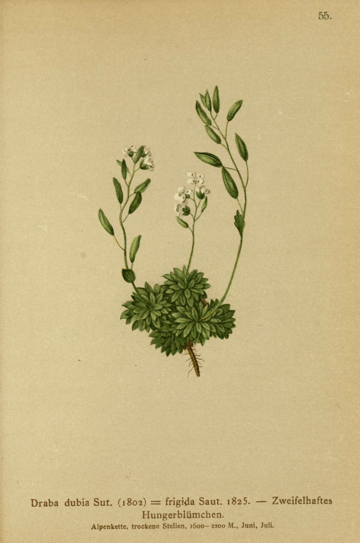 55. Draba dubia Sut. (1802) = frigida Saut. 1825. — Zweifelhaftes Hungerbiümchen. Alpenkette, trockene Stellen, 1600—2200 M., Juni, Juli.